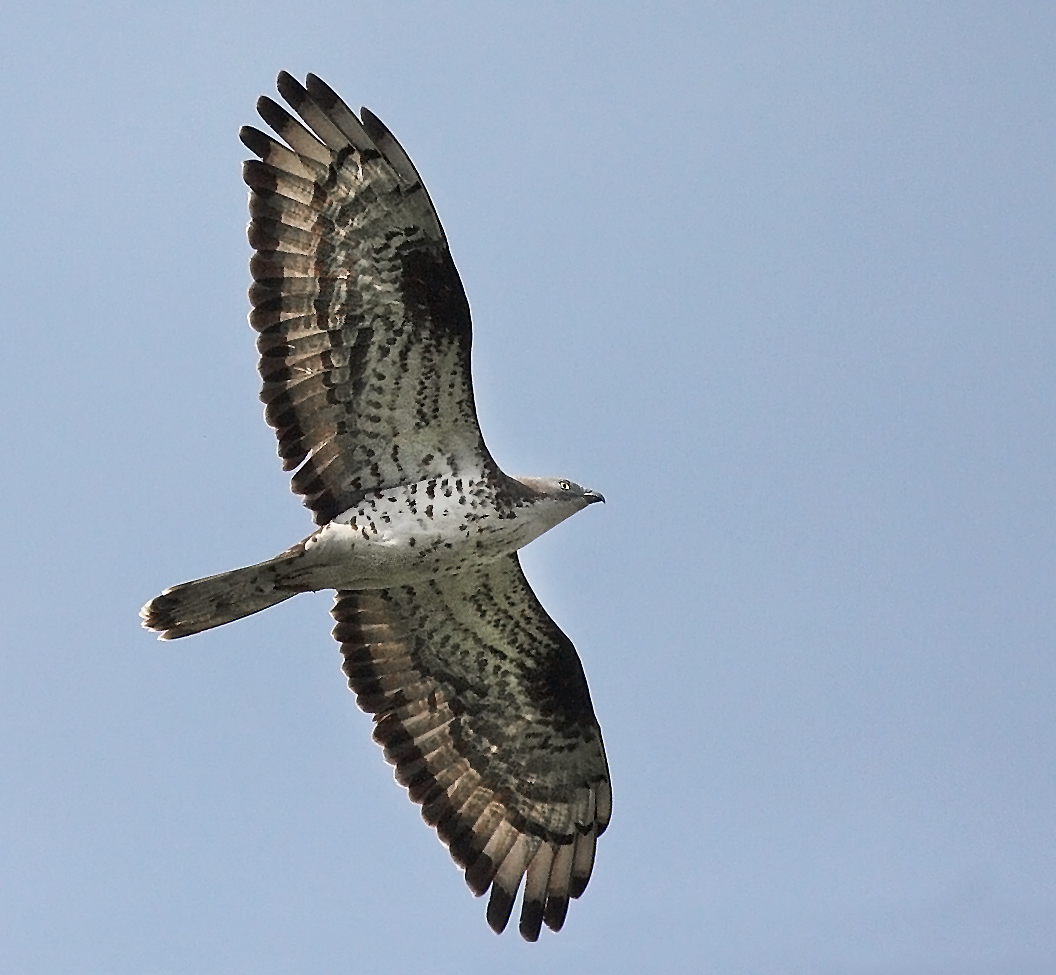 Wespenbussard (Pernis apivorus) helle Morphe im Flug